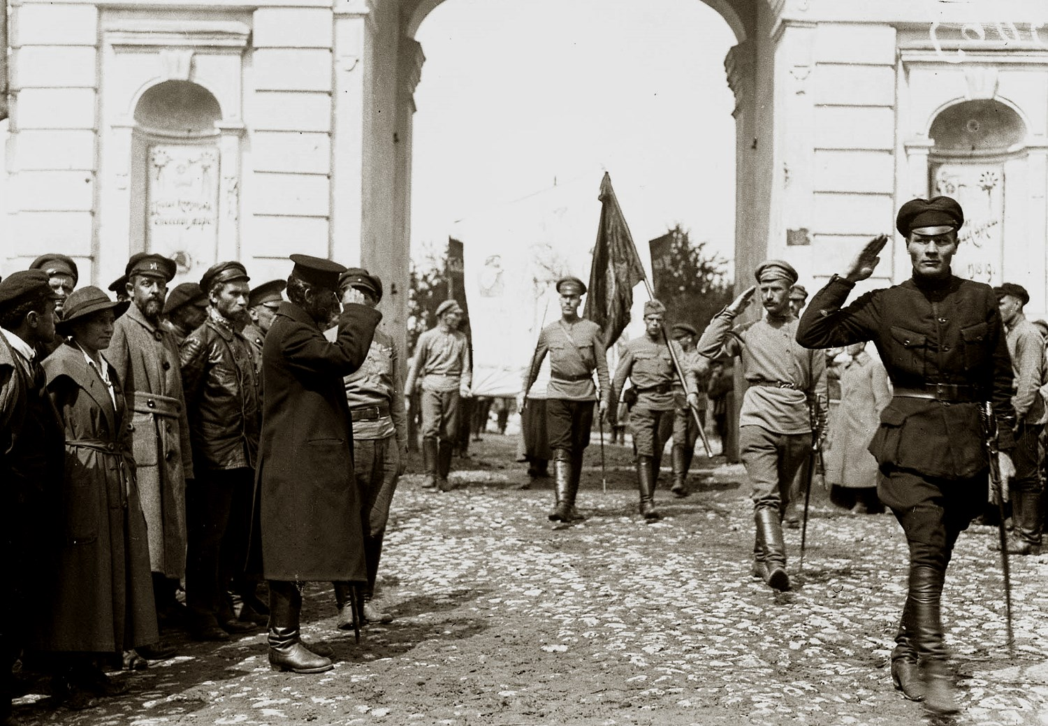 Беларуская (тарашкевіца): Магілёў (Mahiloŭ), Быхаўская брама (Bychaŭskaja brama). Сустрэча Калініна з курсантамі Магілёўскіх пяхотных камандных курсаў